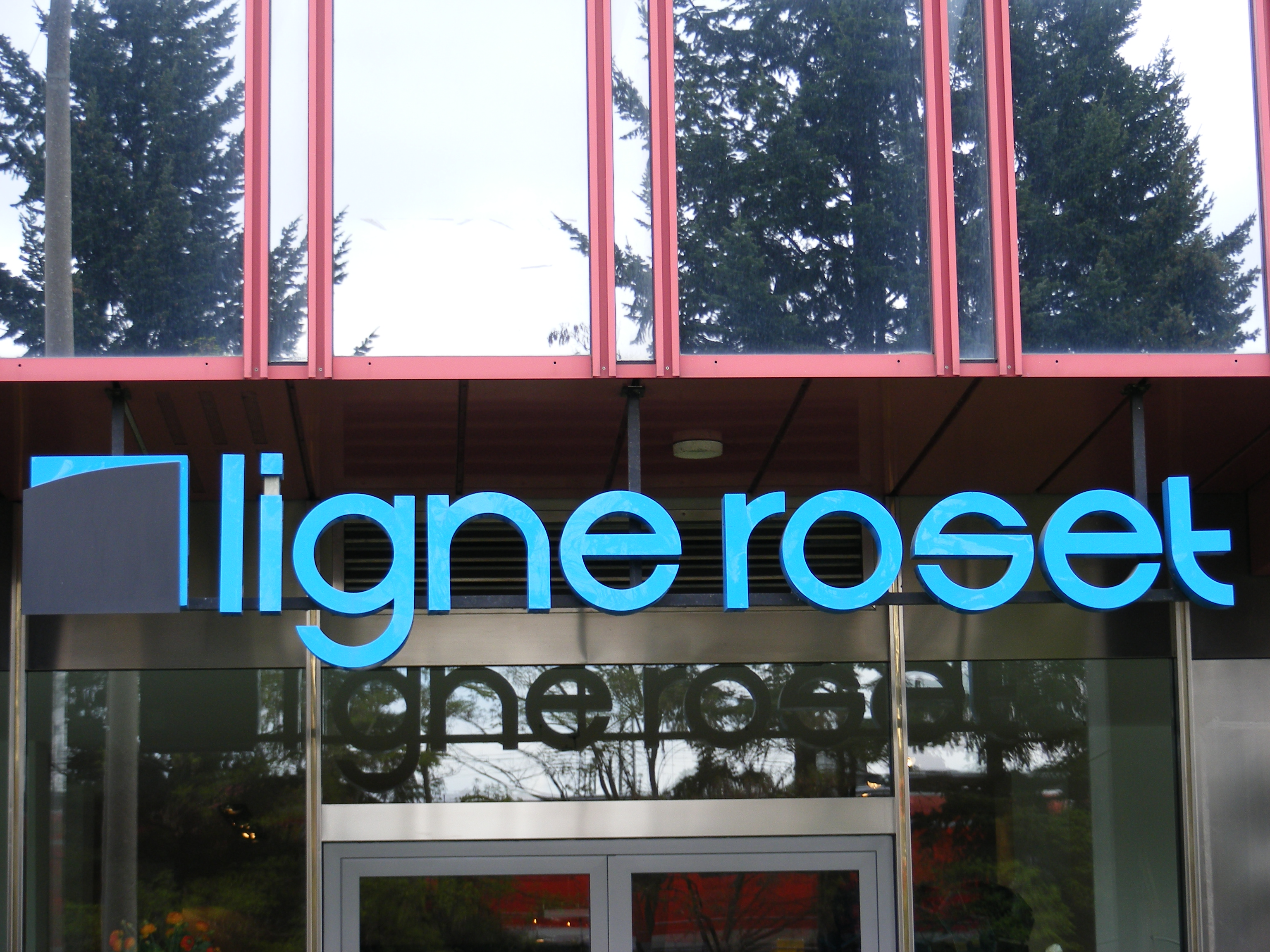 Nürnberg - Ligne Roset